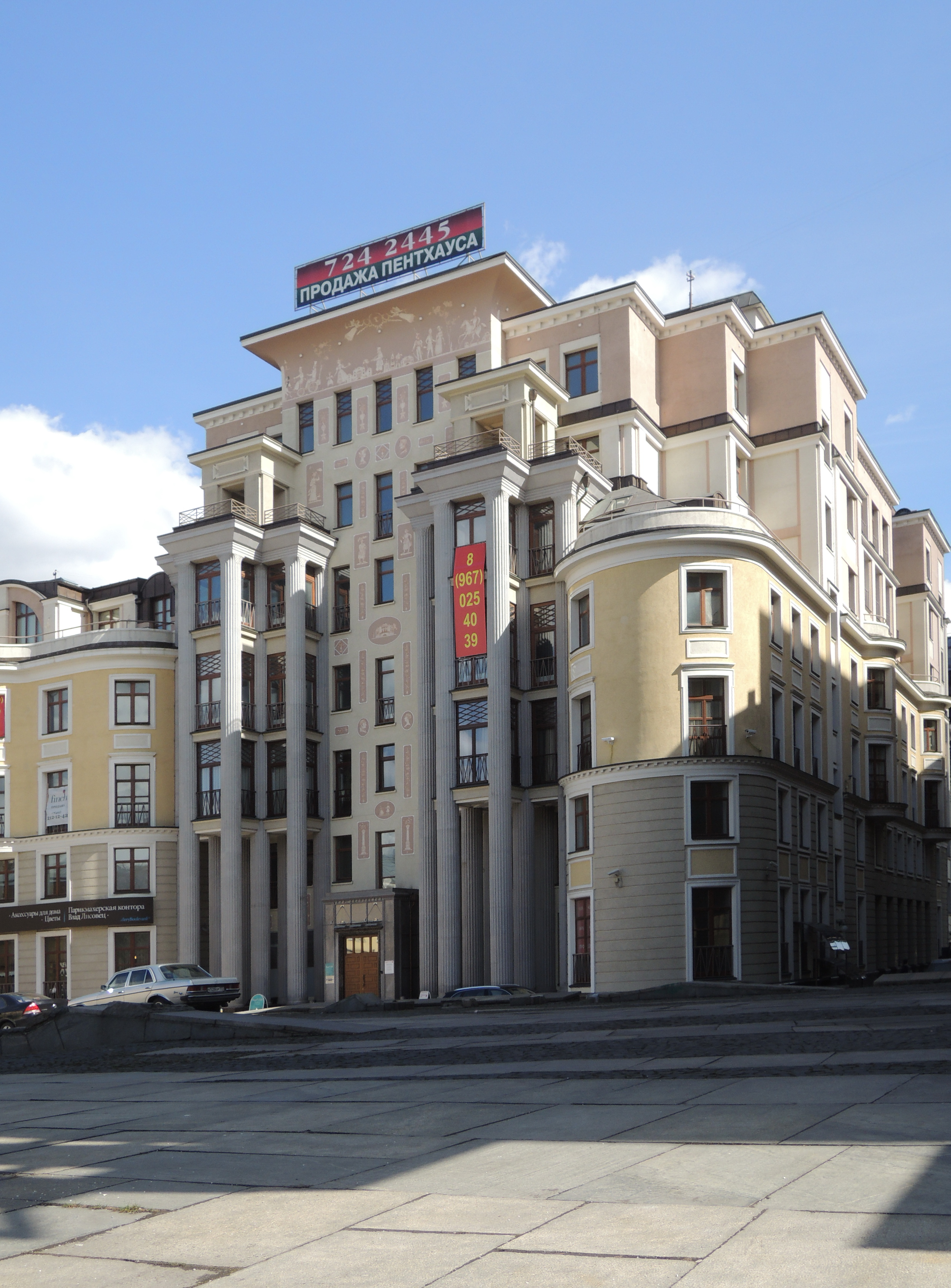 Большой Гнездниковский переулок № 3 — административно-жилой комплекс, 2008, архитекторы С. Ткаченко, Н. Рыбин, О. Дубровский, Л. Шевченко[3]. Ранее на этом месте стоял Sight symbol black.svg памятник архитектуры (региональный) — дом драматурга К. А. Тарновского, которого часто посещали М. С. Щепкин, Г. Н. Федотова, П. И. Чайковский, Н. Г. Рубинштейн и другие выдающиеся деятели русской культуры[2][4]. В ходе строительства административно-жилого комплекса дом был разобран и заменён новоделом